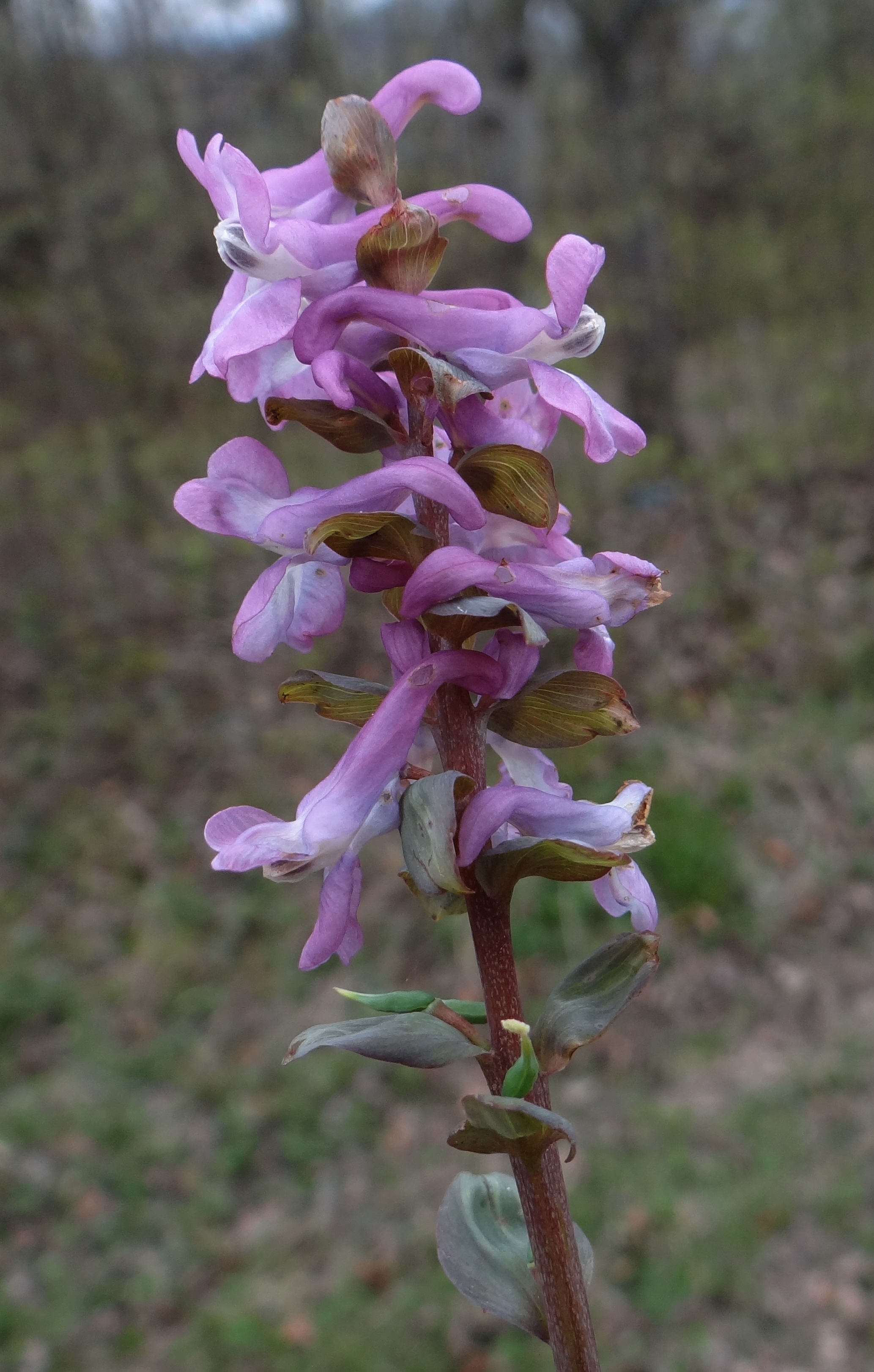 Corydalis cava (location: Poland, Pogórze Rożnowskie, Wał)